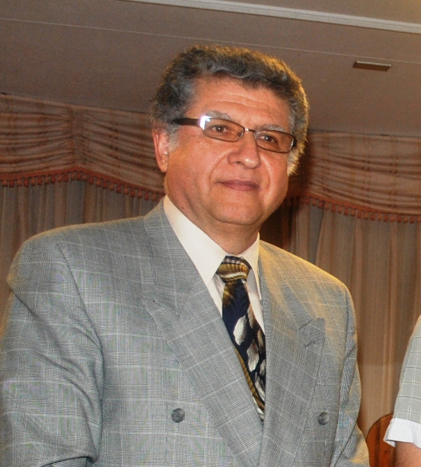 Escritor